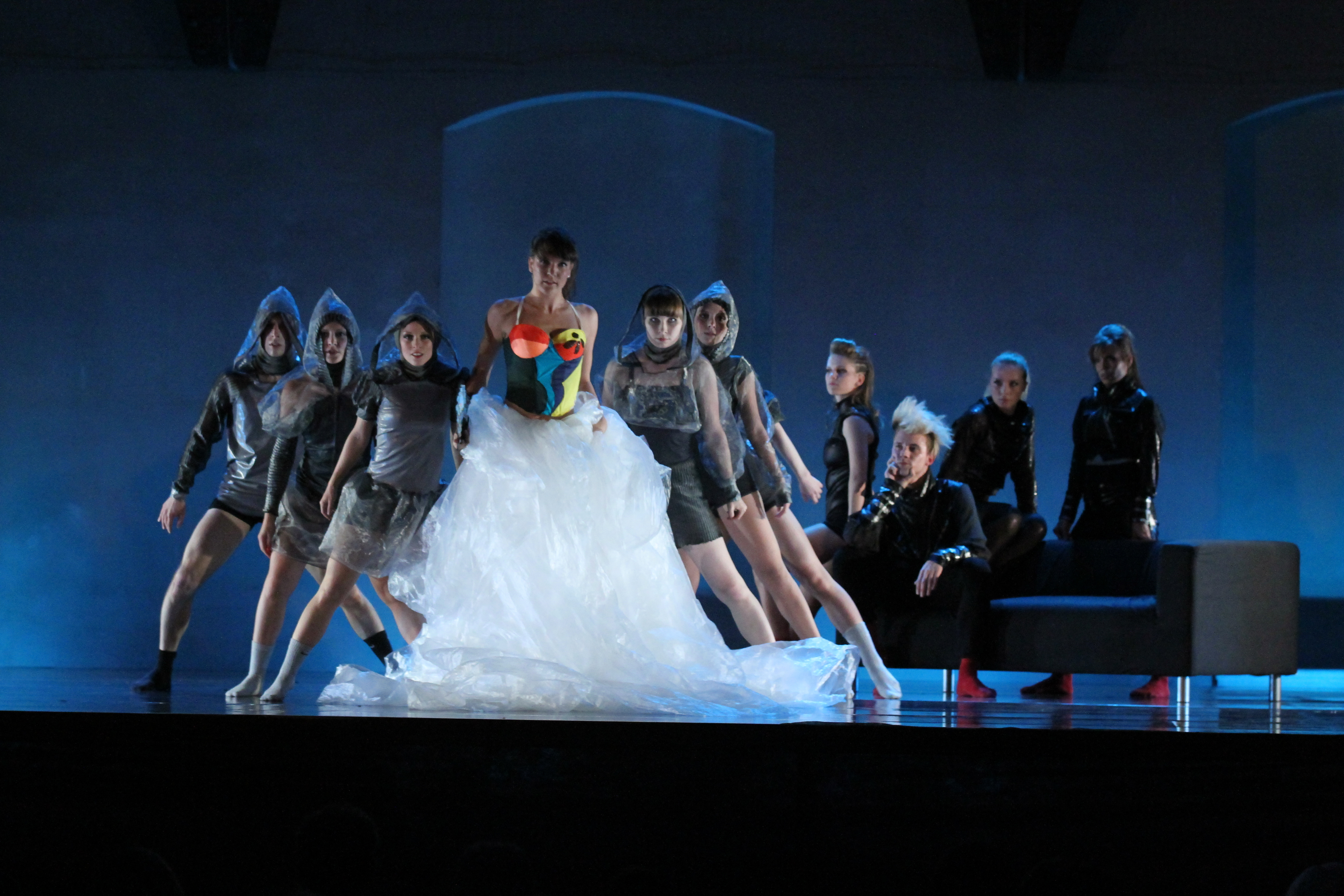 Fotografie z představení Tanecbook - 1. dějství.